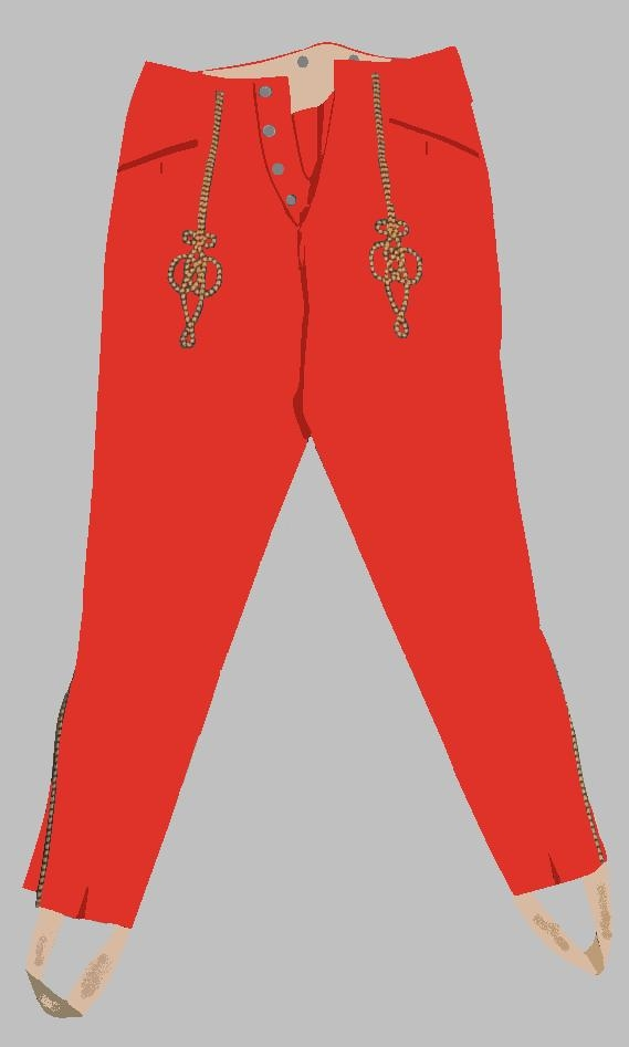 Reithose für Husaren